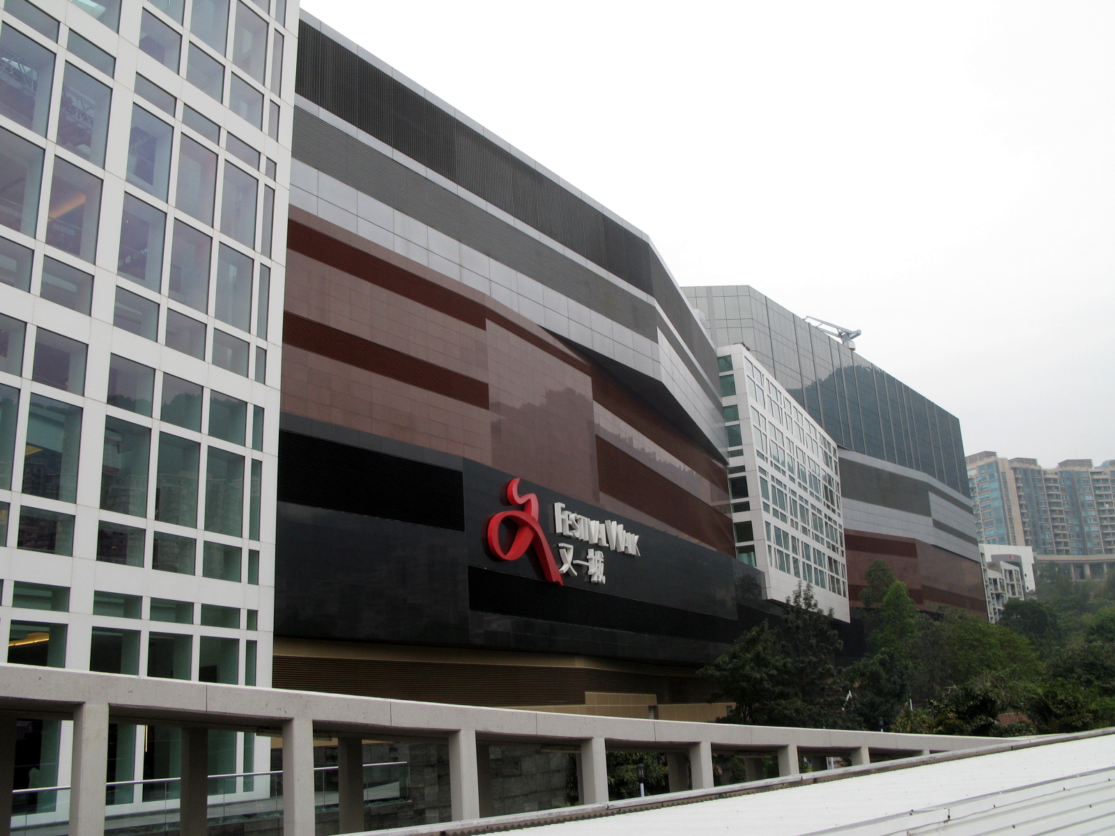 HK Festival Walk Outside view